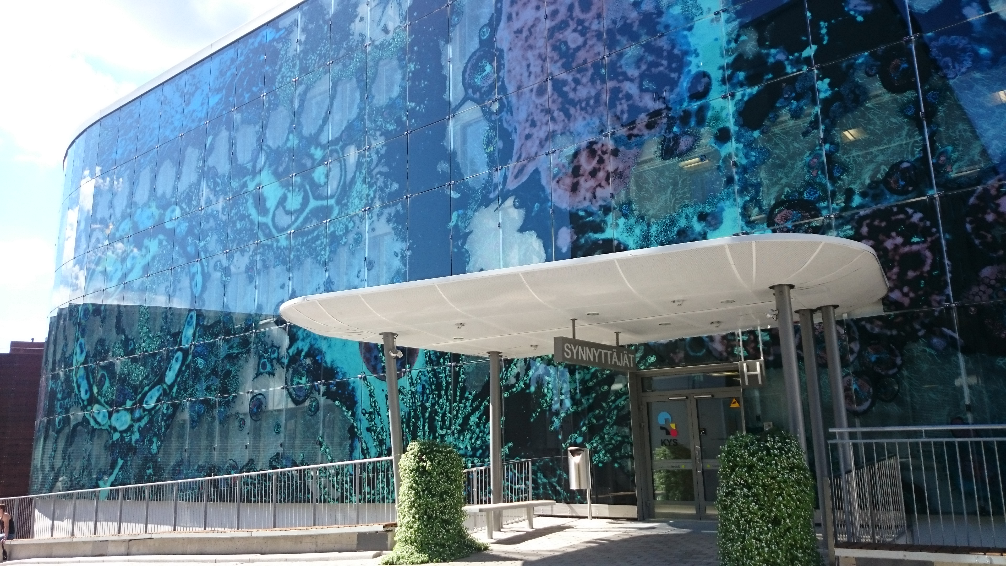 Evoluutio, KYS Kaarisairaala, Kuopio.